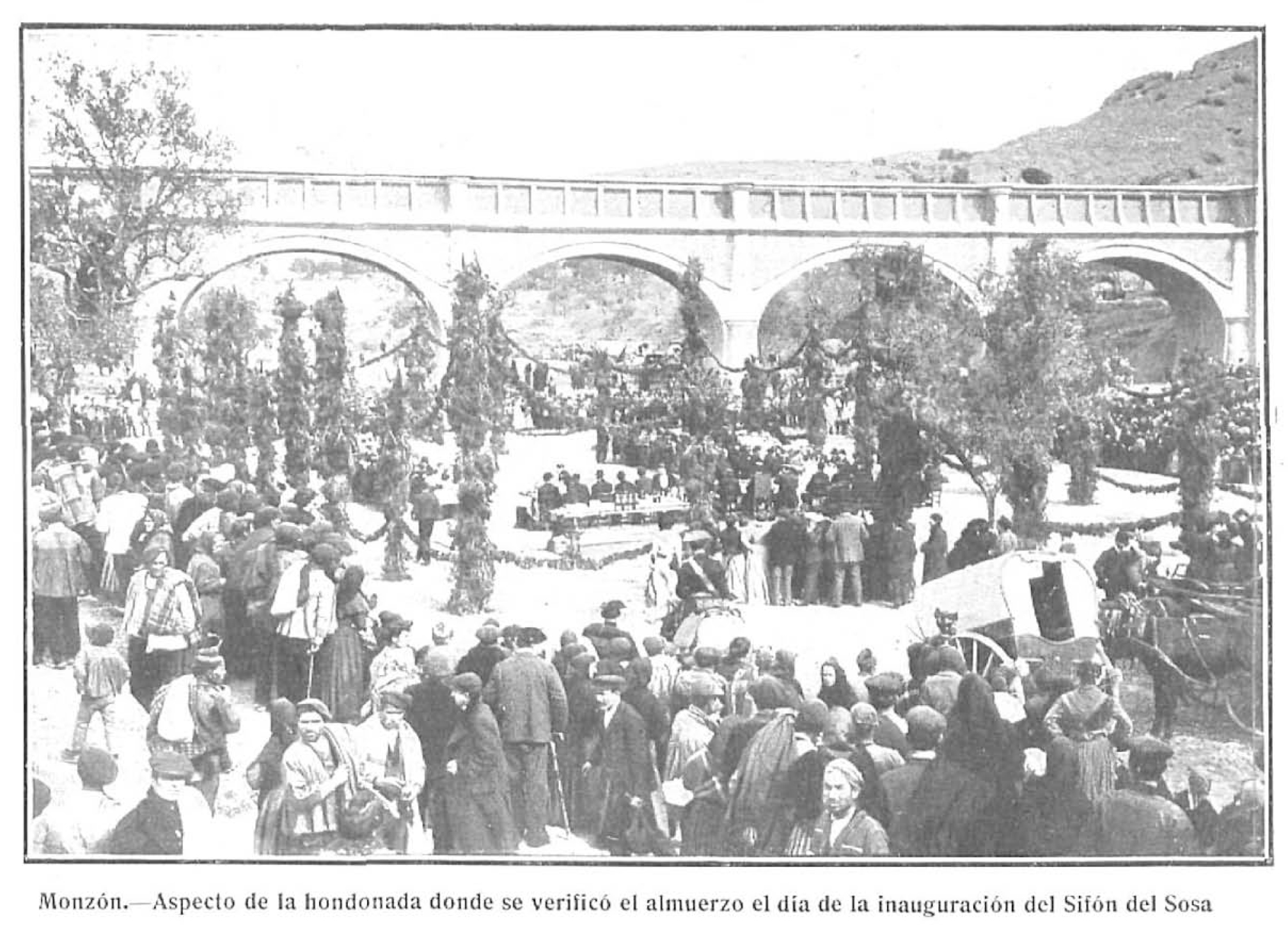 Monzón, Sifón del Sosa.